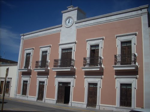 Muy buena foto